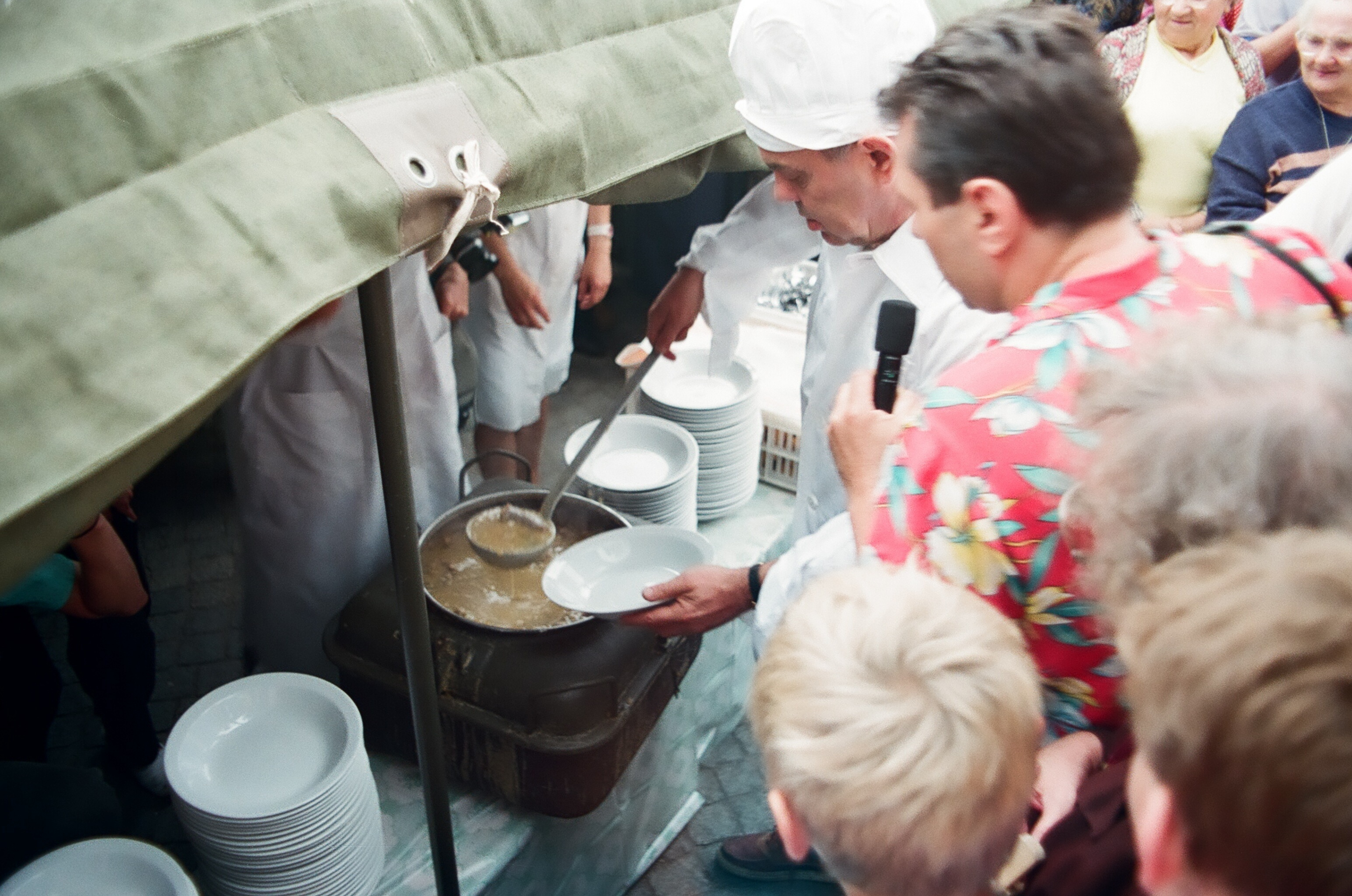 Minister Pracy i Polityki Społecznej Jacek Kuroń podczas rozdawania darmowej zupy (Gorzów Wlkp. Stary Rynek-10.08.1991)